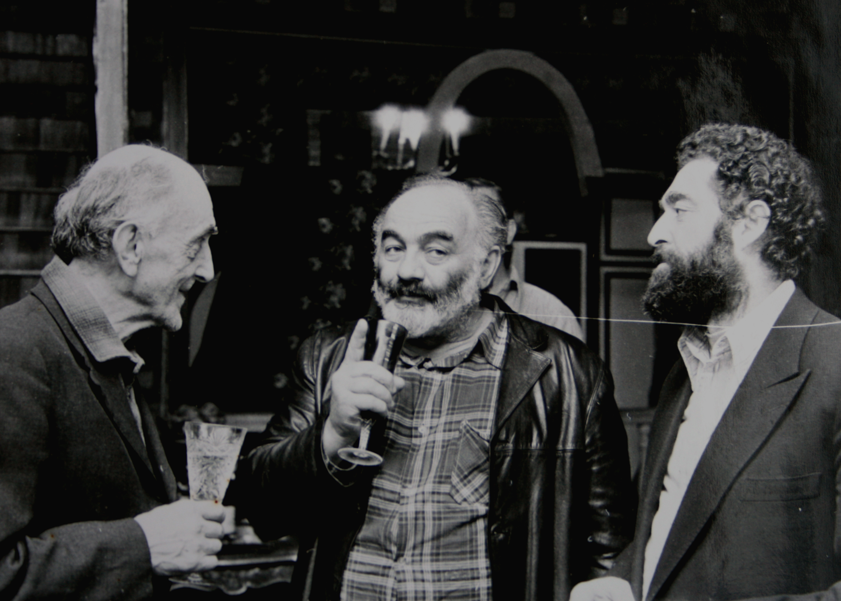 Interesting conversation between famous Armenian film director and artist Sergei Parajanov and Henrik Igityan.